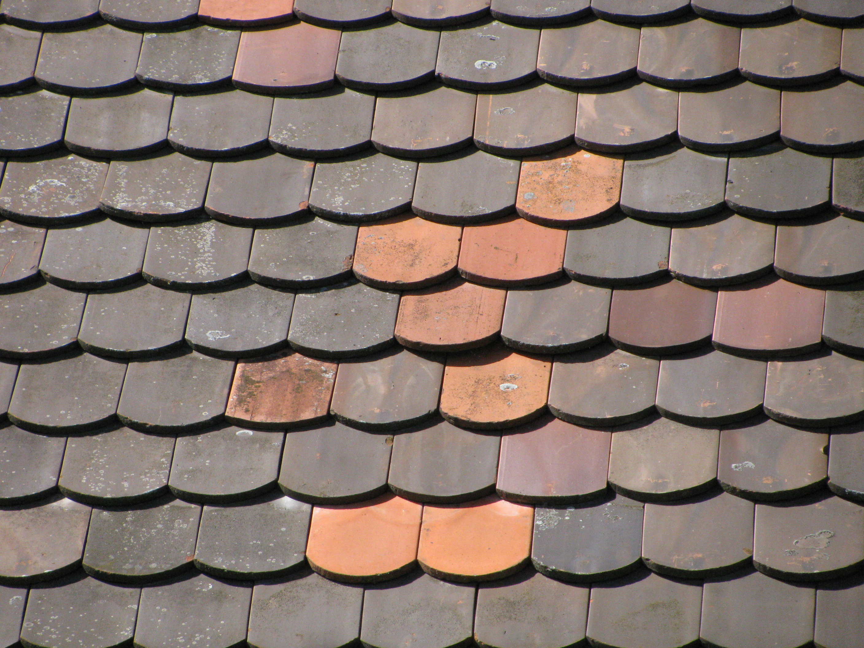 Deutschland - Baden-Württemberg - Bodenseekreis - Kressbronn am Bodensee - Retterschen: Hofanlage Milz, Dachziegel (Biberschwanzplatten)